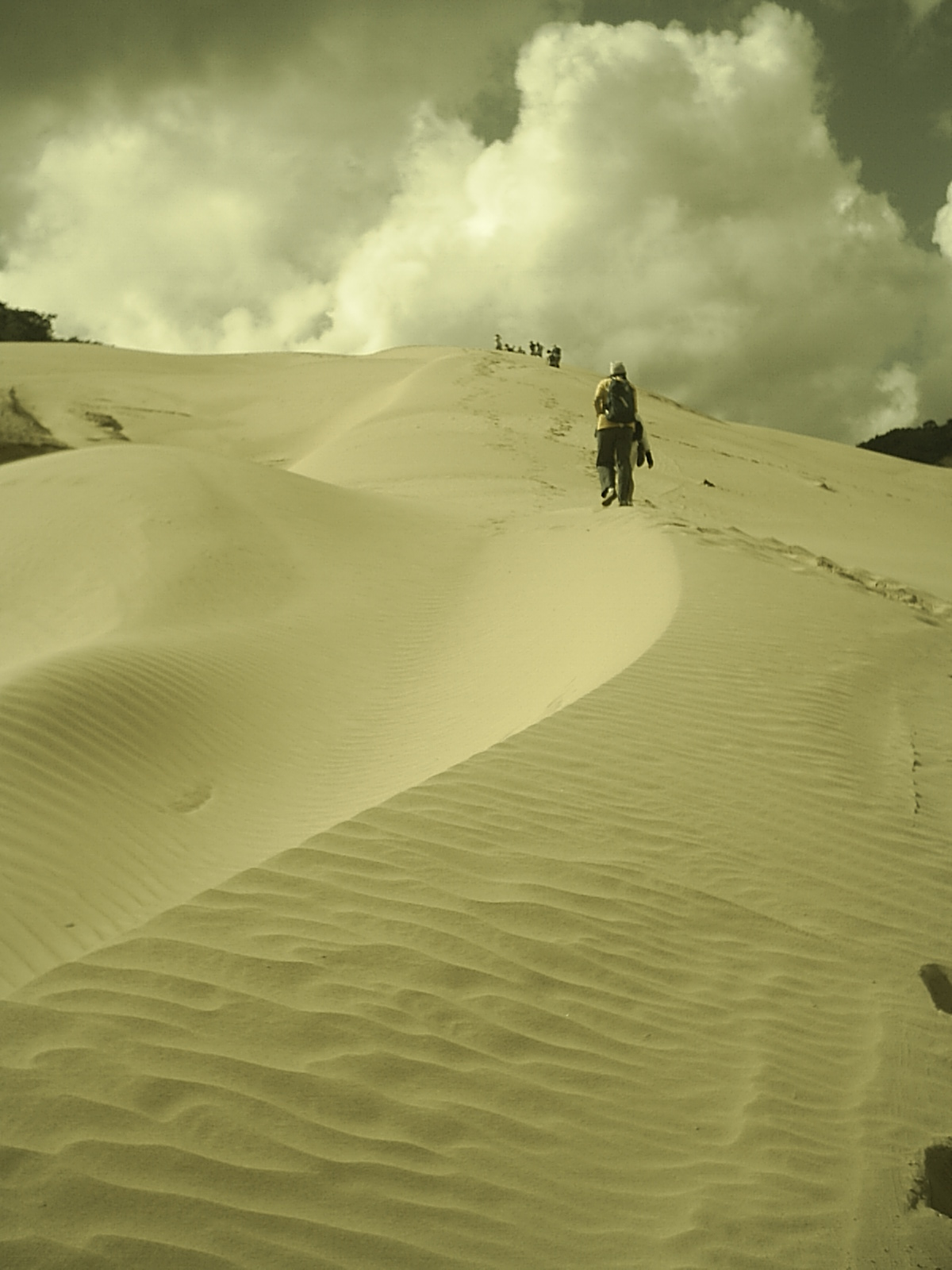 Dunes in Macuira National Park , the Guajira Peninsula, Colombia. Dunas en el parque nacional natural La Macuira, península de la Guajira, Colombia